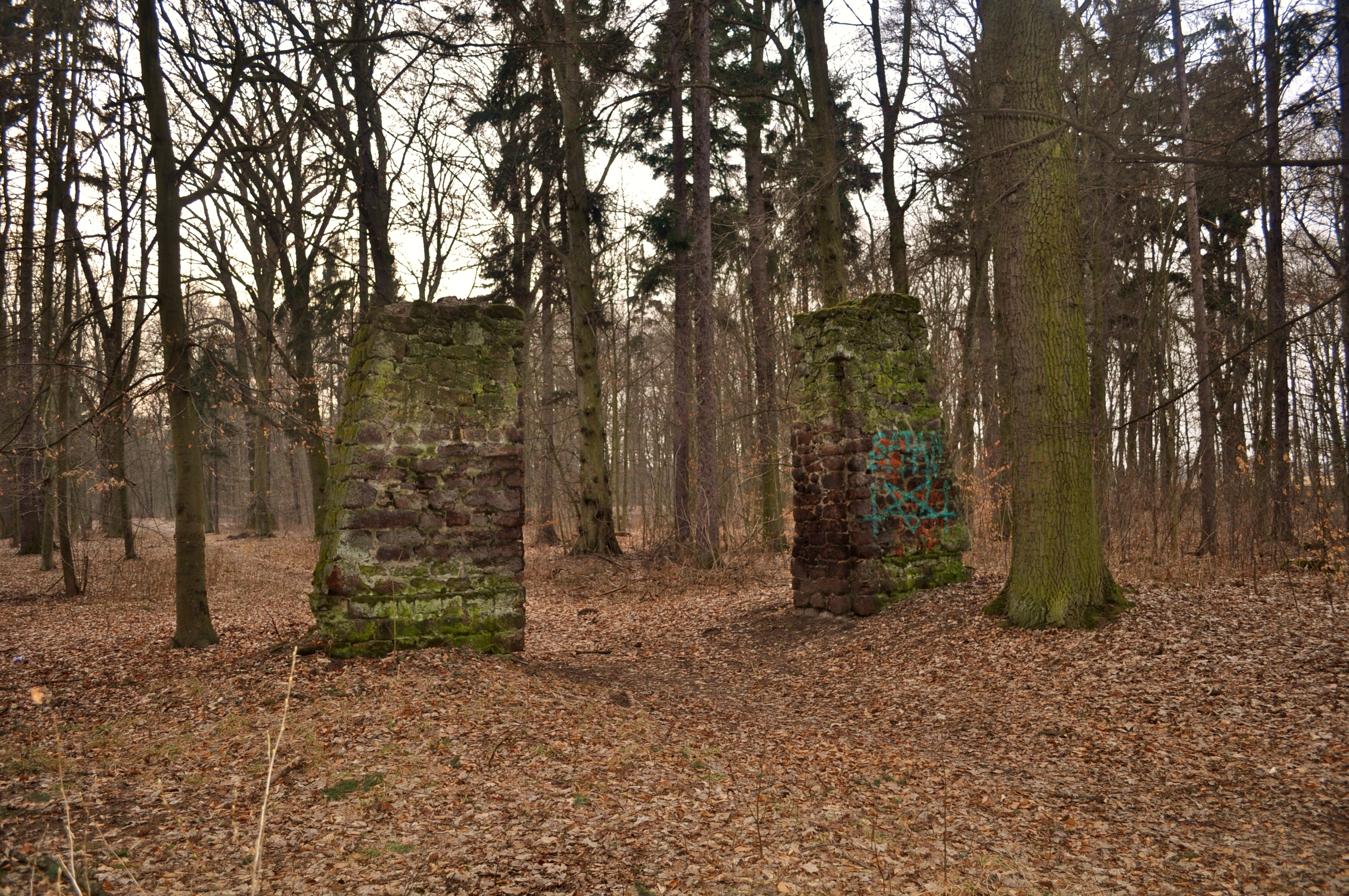 Czarna Brama